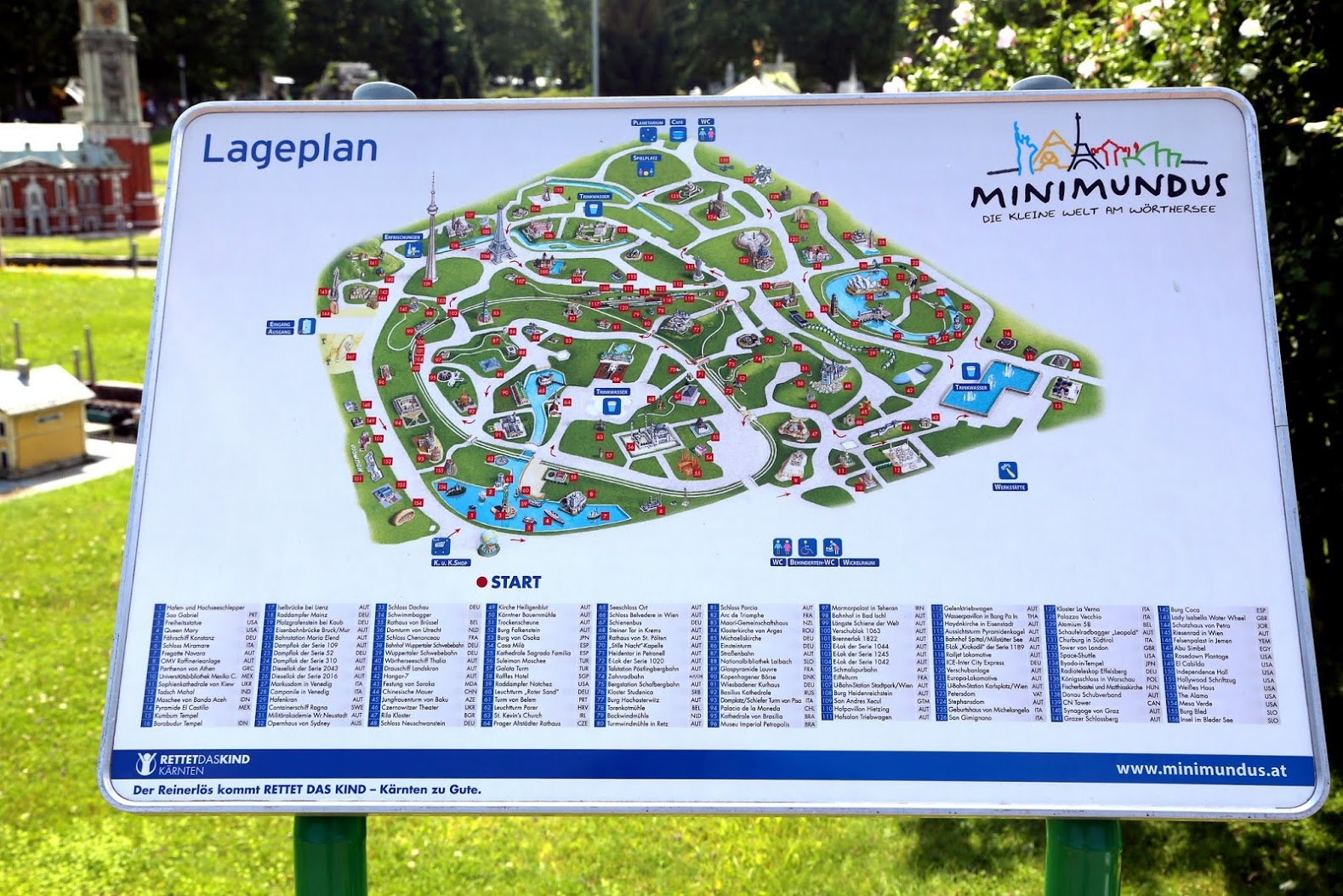 Minimundus Klagenfurt